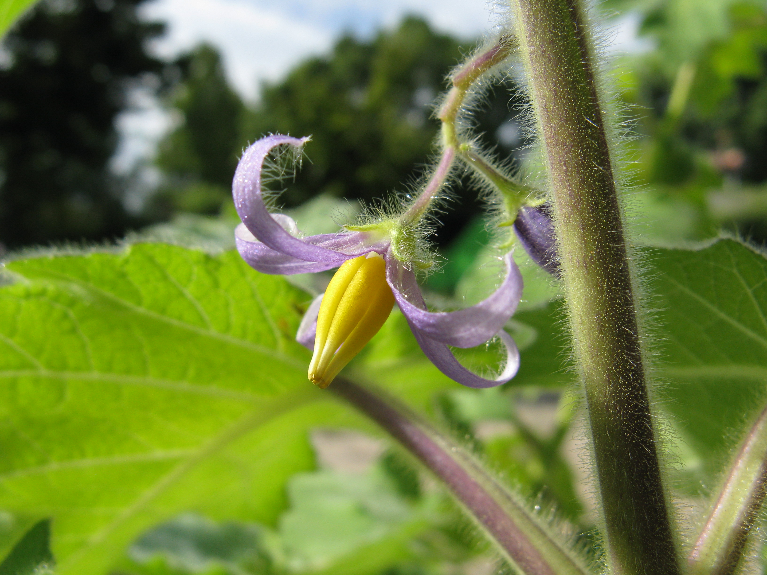 Scientific name Solanum mammosum